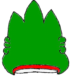 Glifo de Tepehuacán de Guerrero, Hidalgo